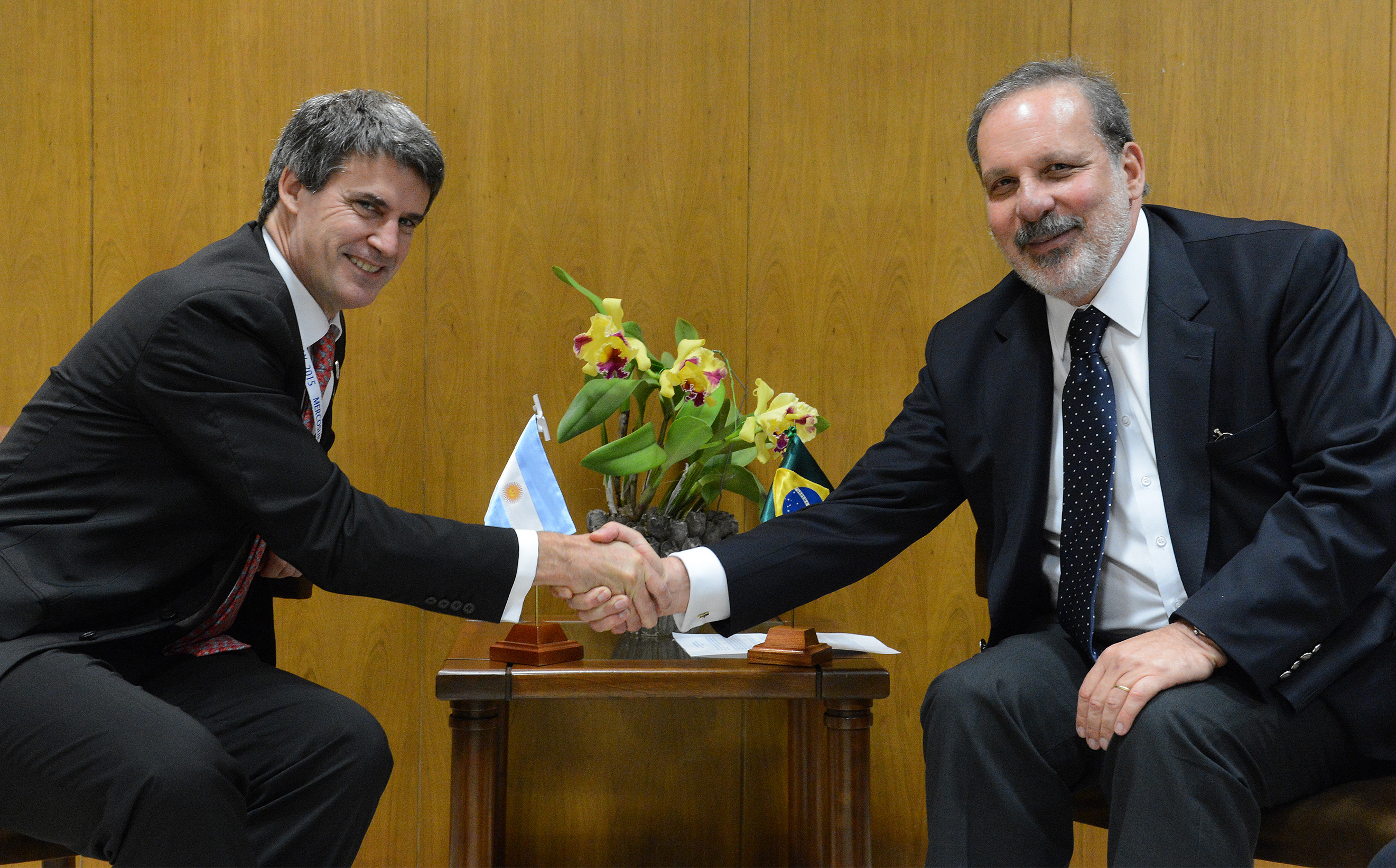 Alfonso Prat Gay junto al ministro de Desarrollo, Industria y Comercio Exterior de Brasil, Armando Monteiro, en la reunión del Mercosur en Paraguay